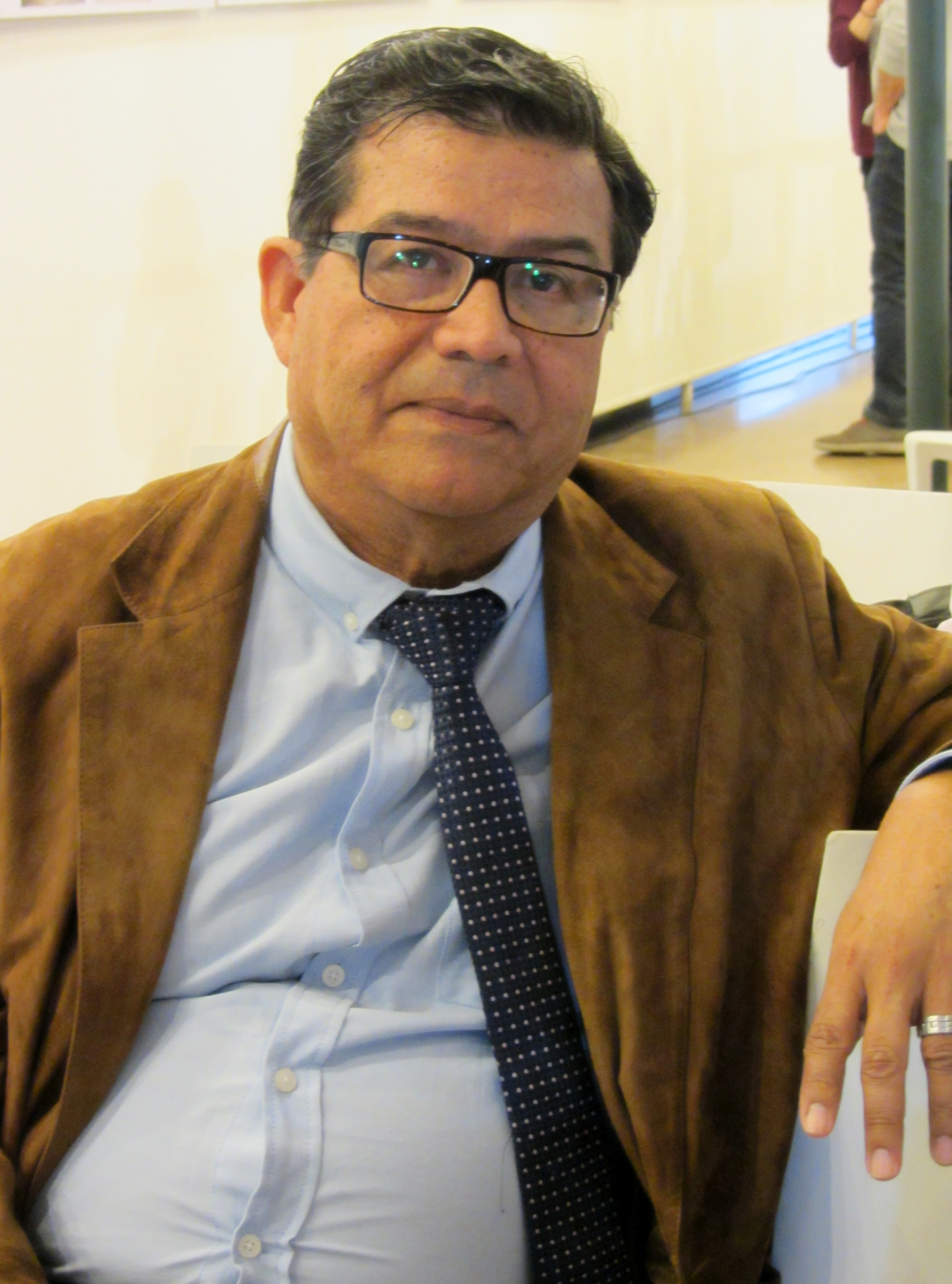 El historiador chileno Sergio González Miranda en la Feria Internacional del Libro de Santiago 2015